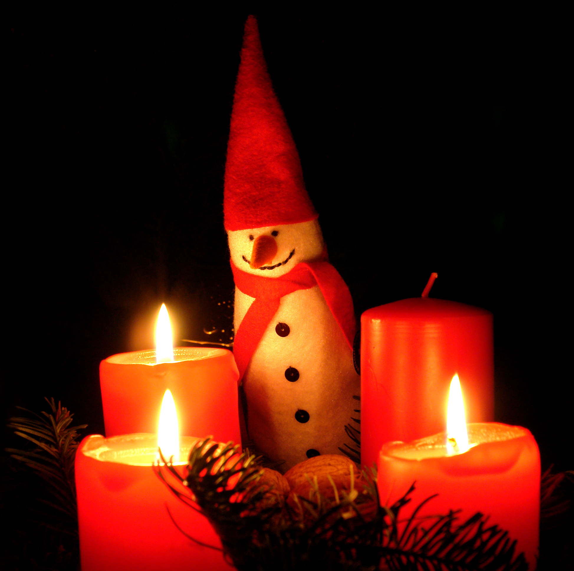 Adventsgesteck mit drei brennenden Kerzen